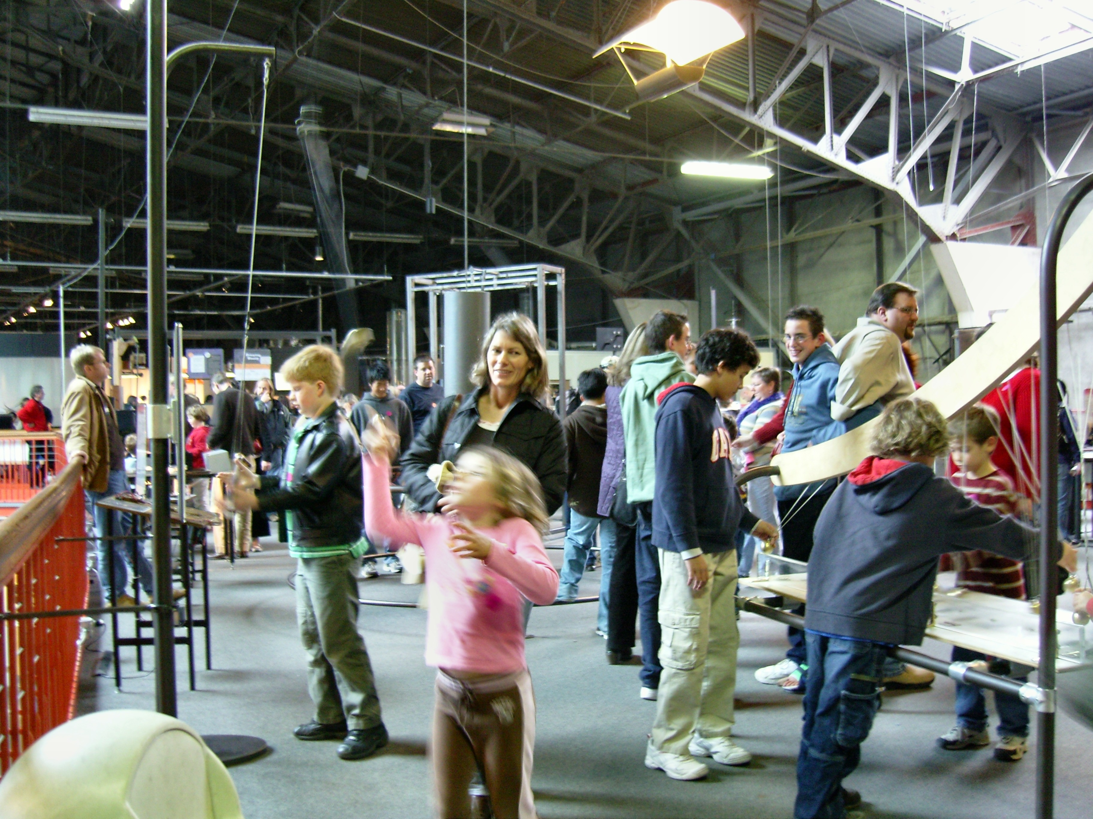 Exploratorium, San Francisco, California.